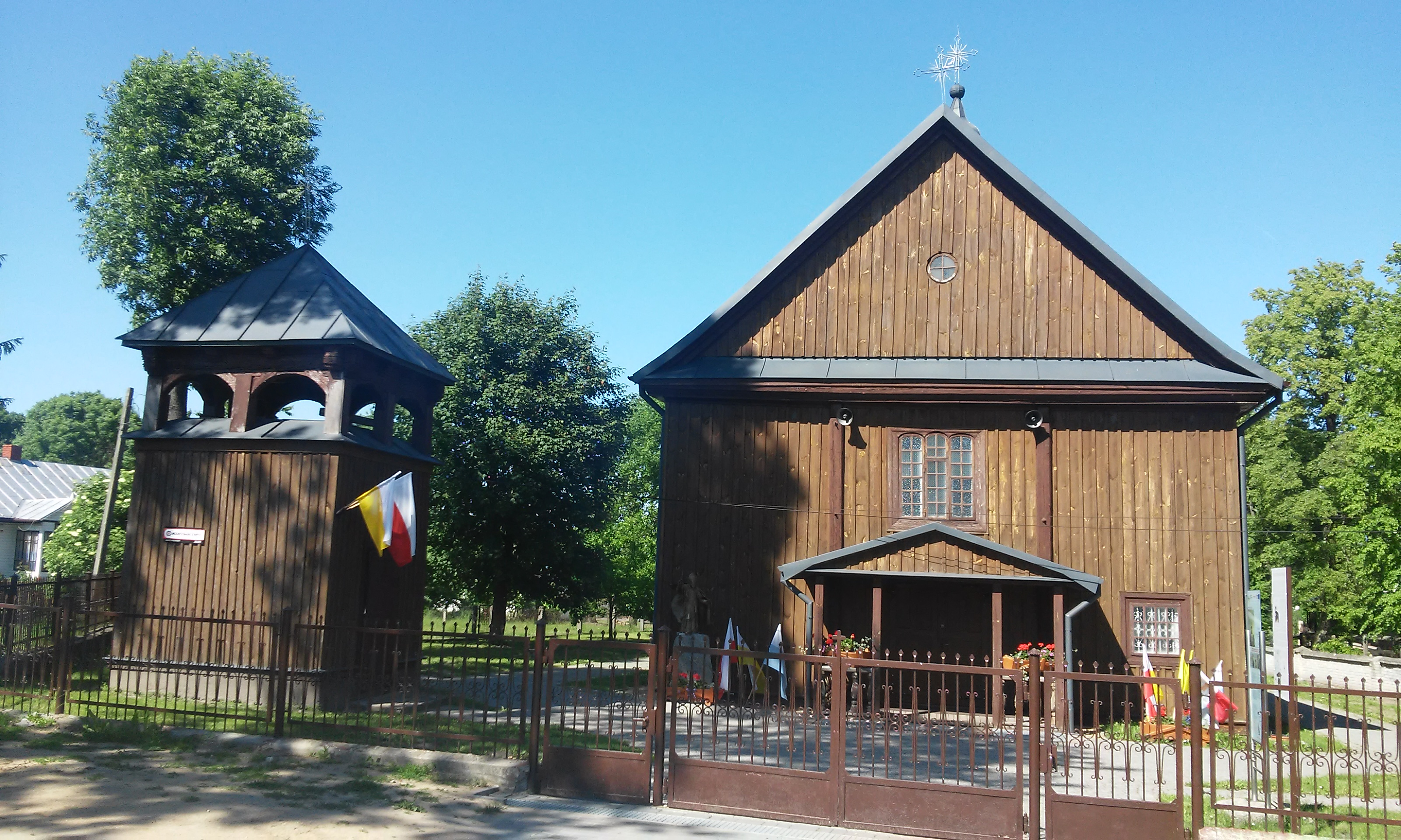 Kościół, dawniej cerkiew, w Gródku